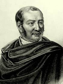 Porträt des Artzes Bernhard Joseph Hartz auf den Seiten der bayrischen Akademie der Wissenschaften